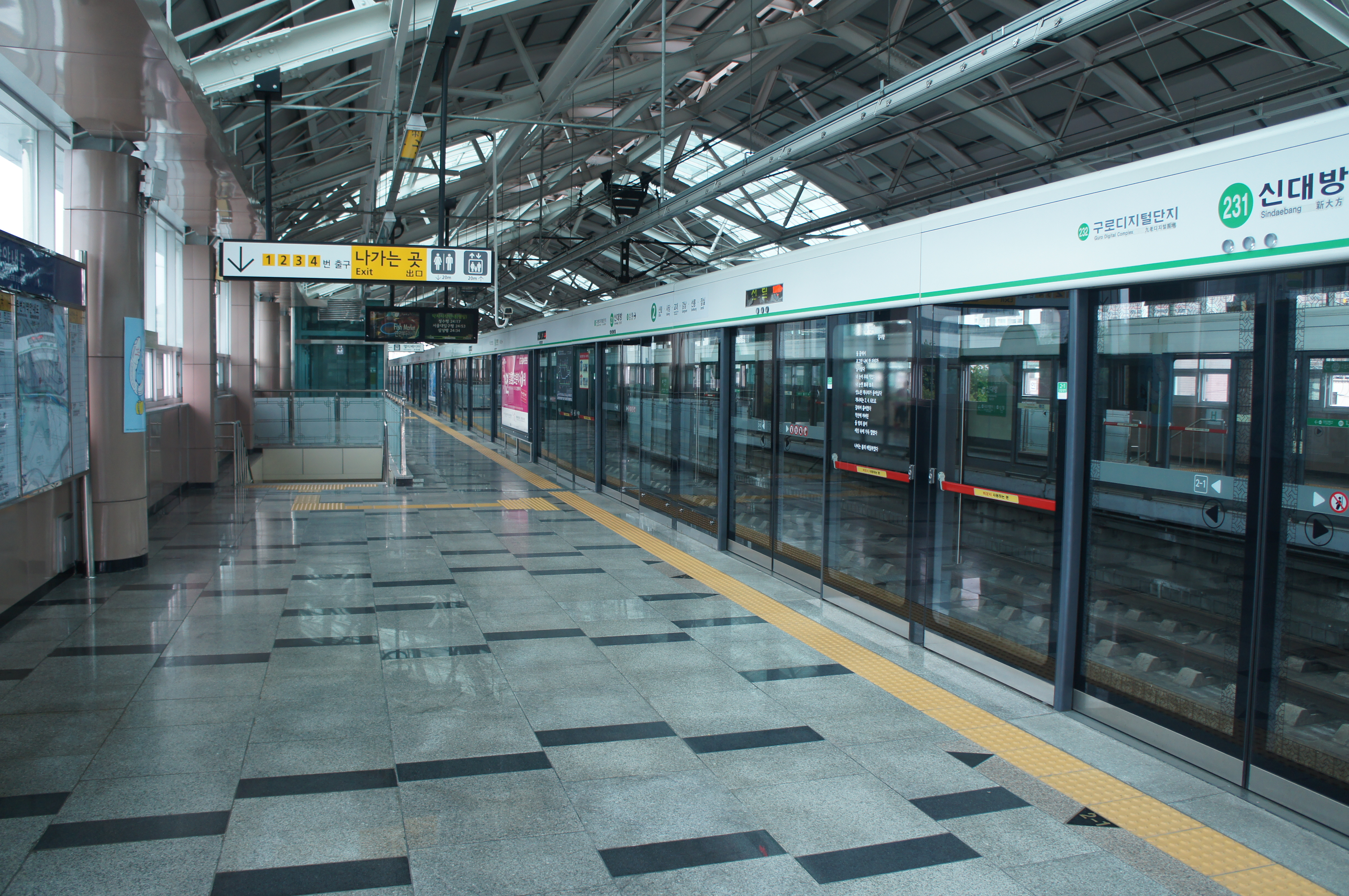 신대방역 승강장